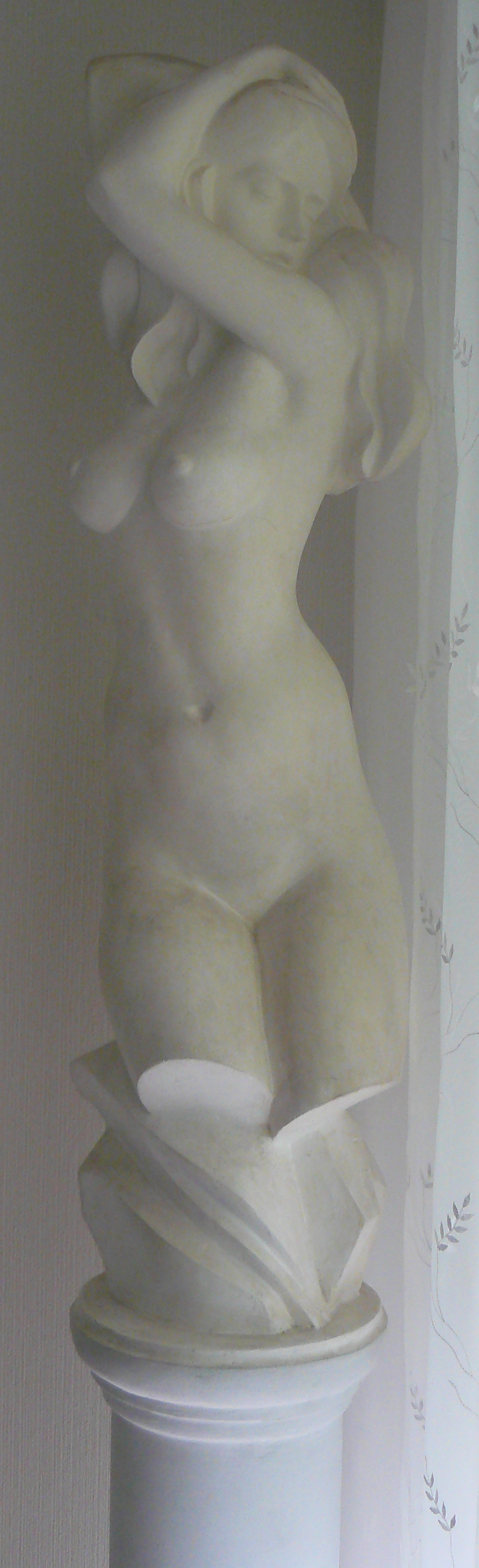 К. Козловский. "На рассвете", 1997 г, бетон, 220 см